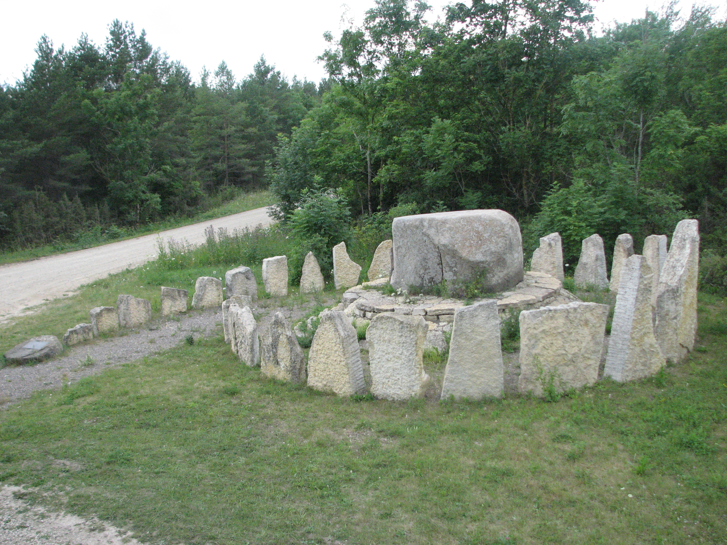 Kividest ring Laheküla servas Laimjala vallas